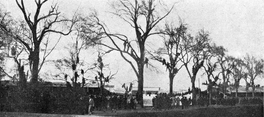 925 (janvier), gens dans les arbres au stade des Ponts-Jumeaux de Toulouse, pour le match international France-Nouvelle-Zélande